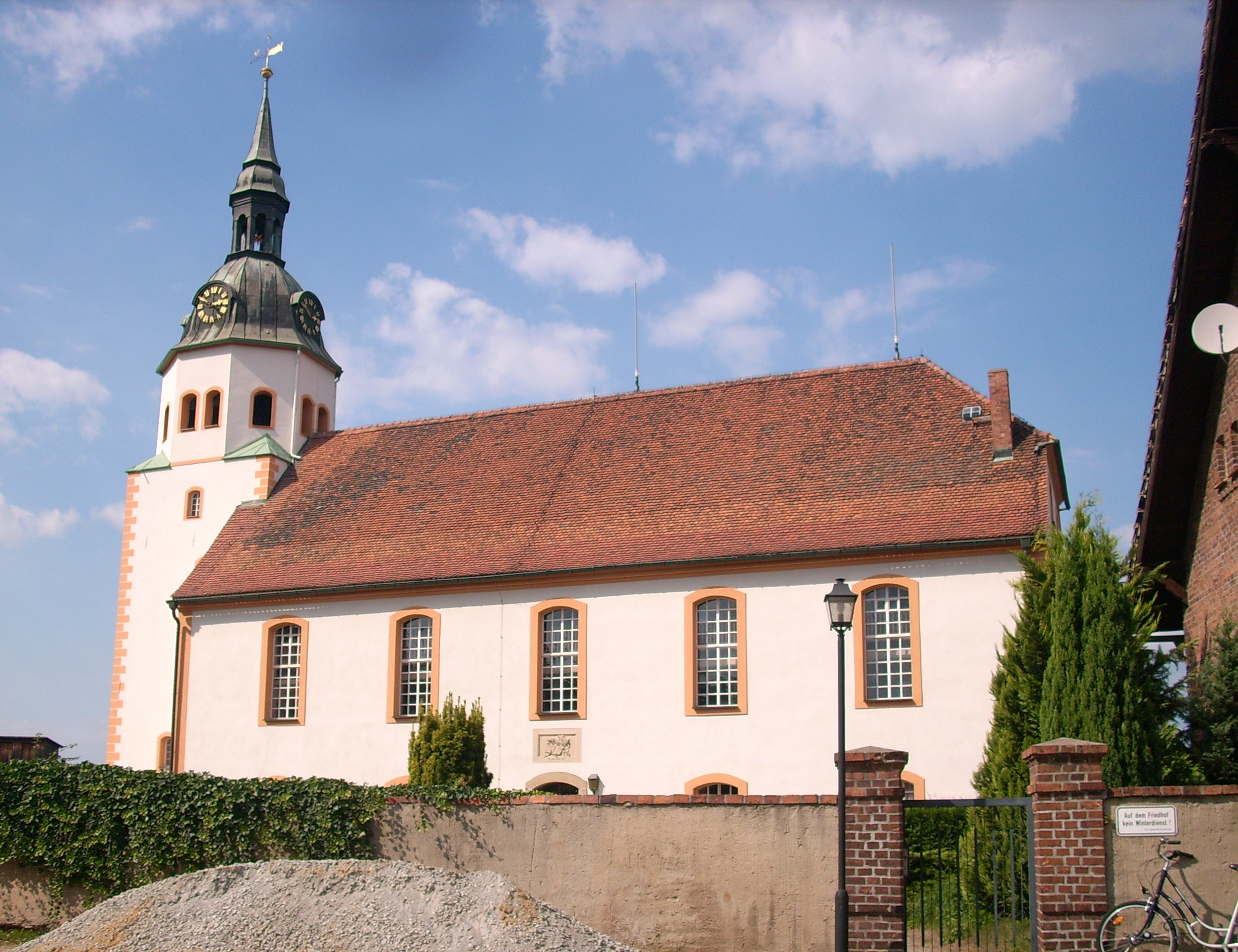 Kirche in Groß Särchen (Ortsteil von Lohsa)